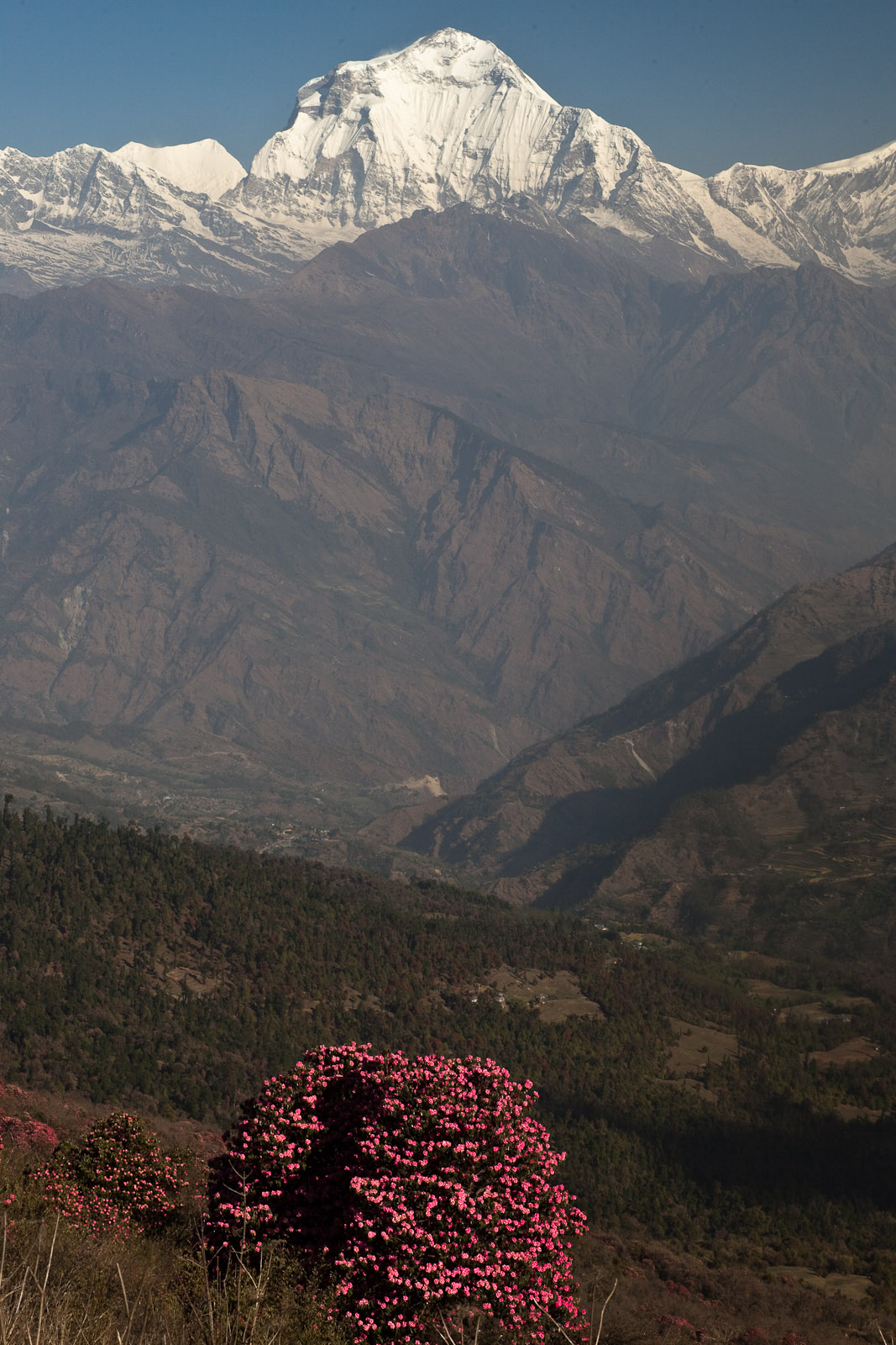 Dhaulagiri and a rhododendron tree